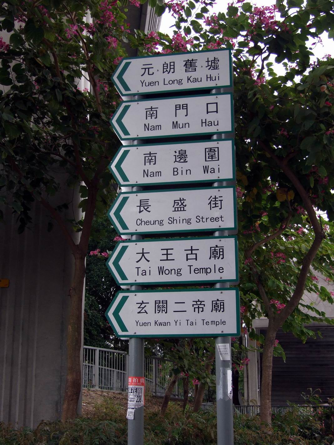 元朗舊墟路牌 Sign along Long Yip Street, Yuen Long, Hong Kong